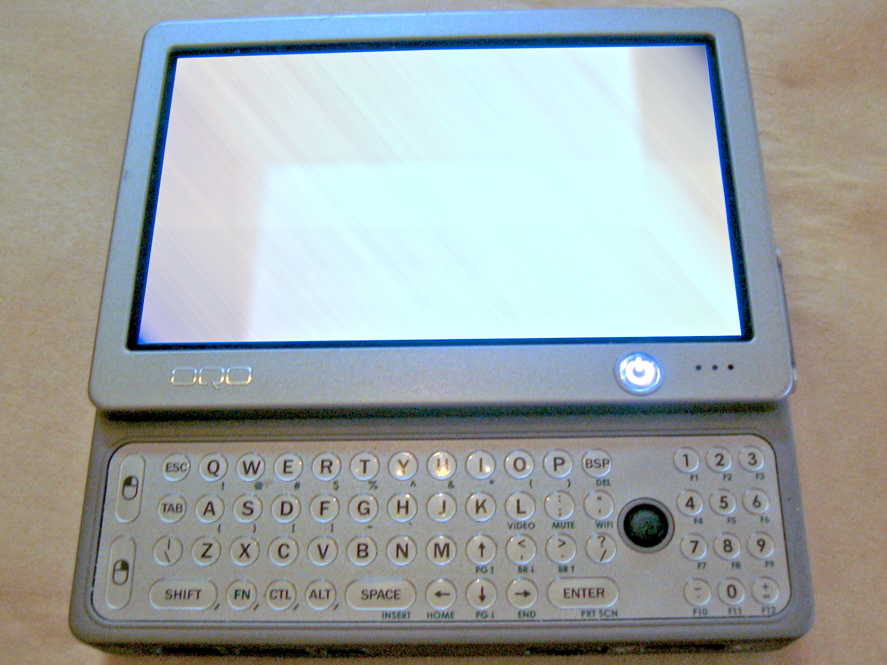 OQO Model 01.OQO Computer